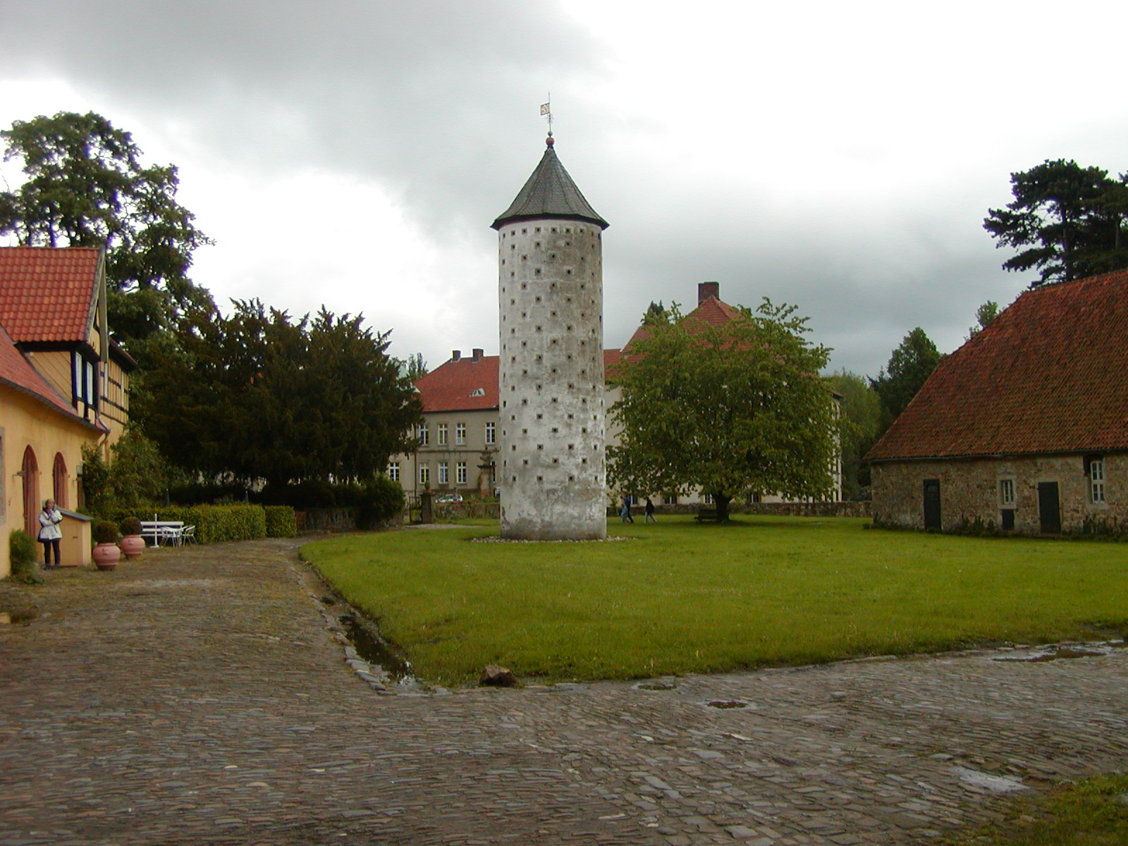 Taubenturm Schloss Hünnefeld